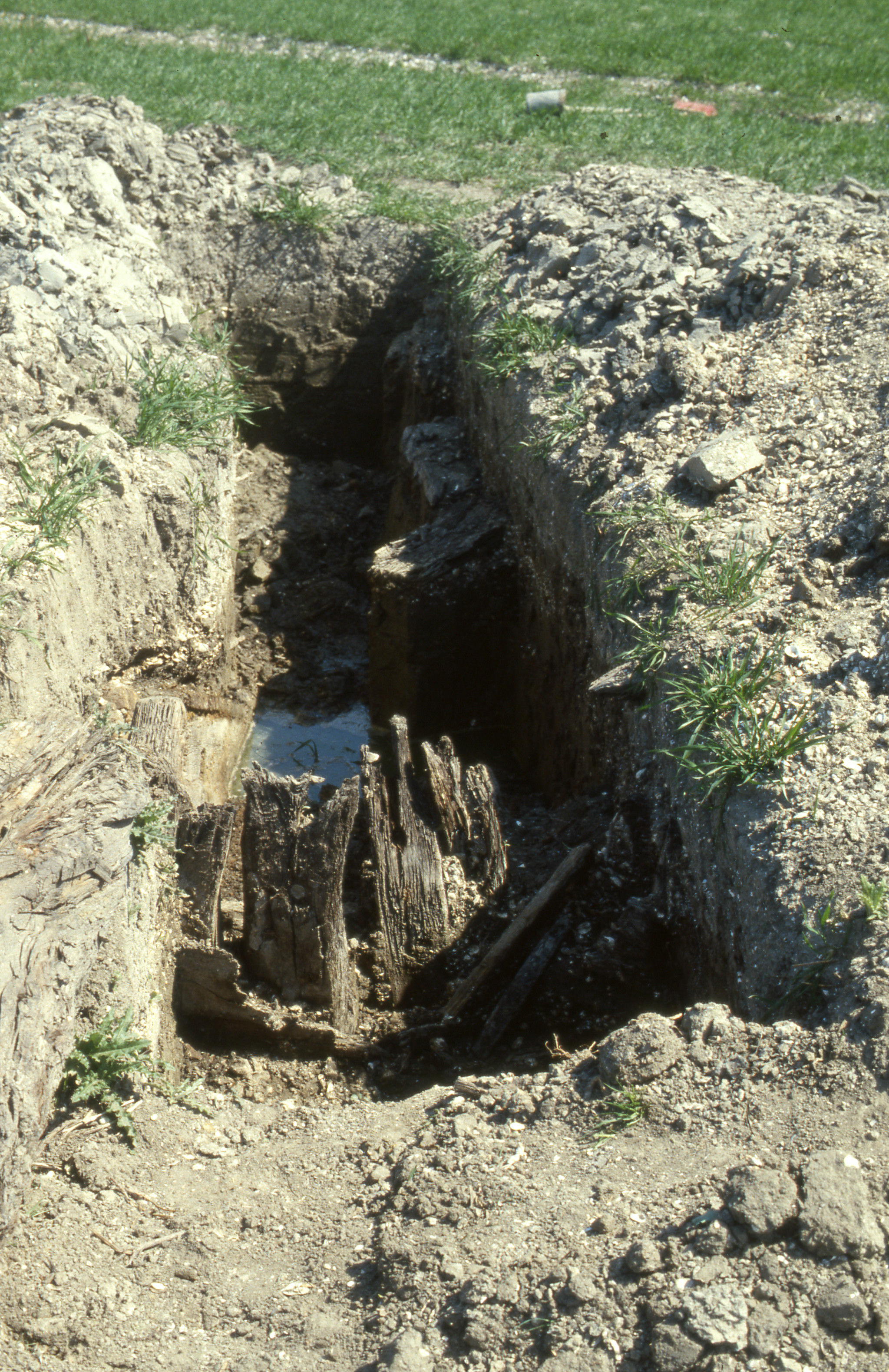 overzicht proefsleuf nr 2 gezien van stuurboordzijde naar bakboordzijde Objectnummer: [MA]D-51941